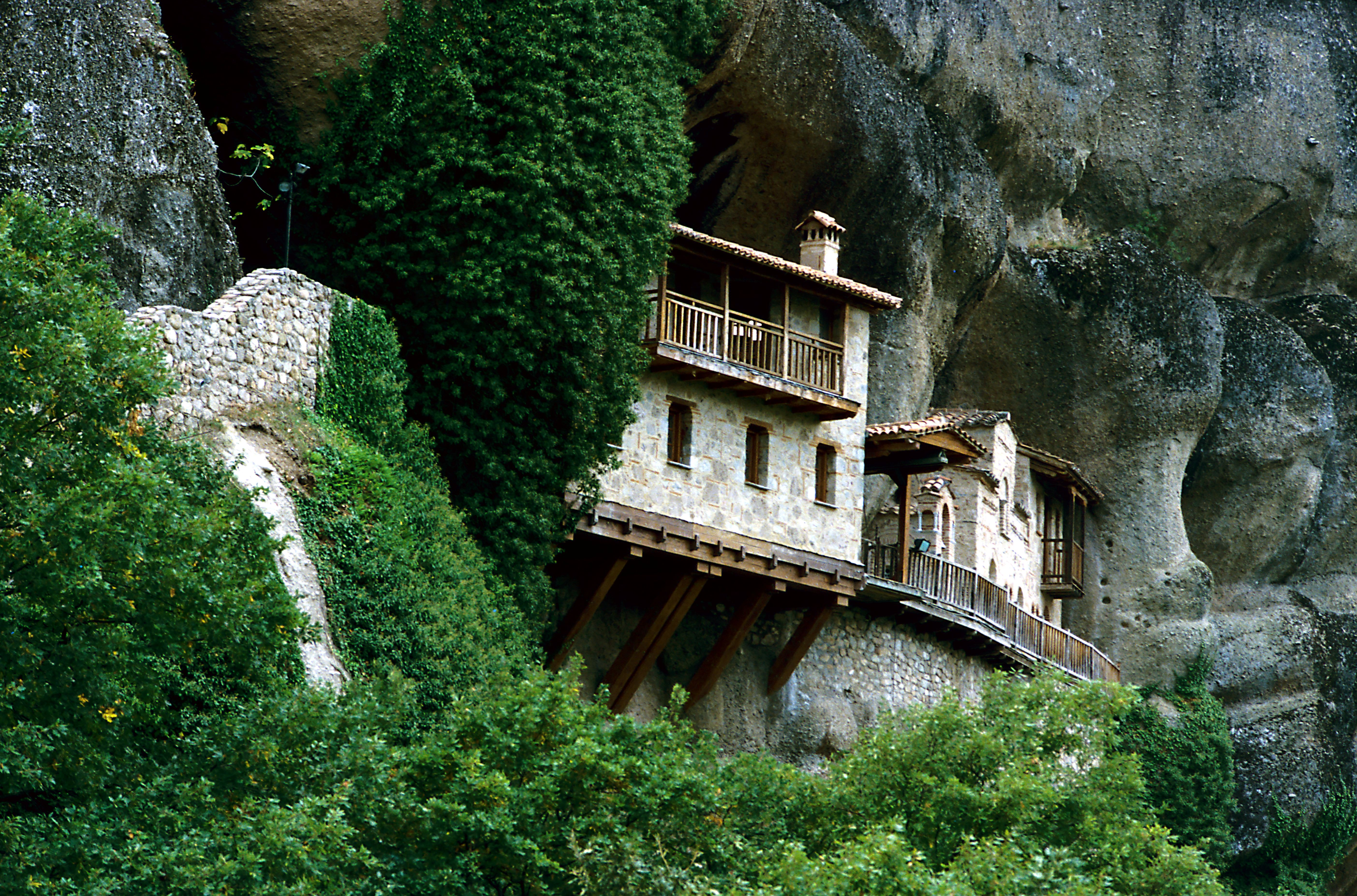 Das noch immer unbewohnte Kloster Ypapantí ist das einzige erhaltene in Meteora, das nicht auf einer Bergkuppe, sondern in der Flanke des Dimitriossteins liegt. Nur das Wohngebäude kragt vor.